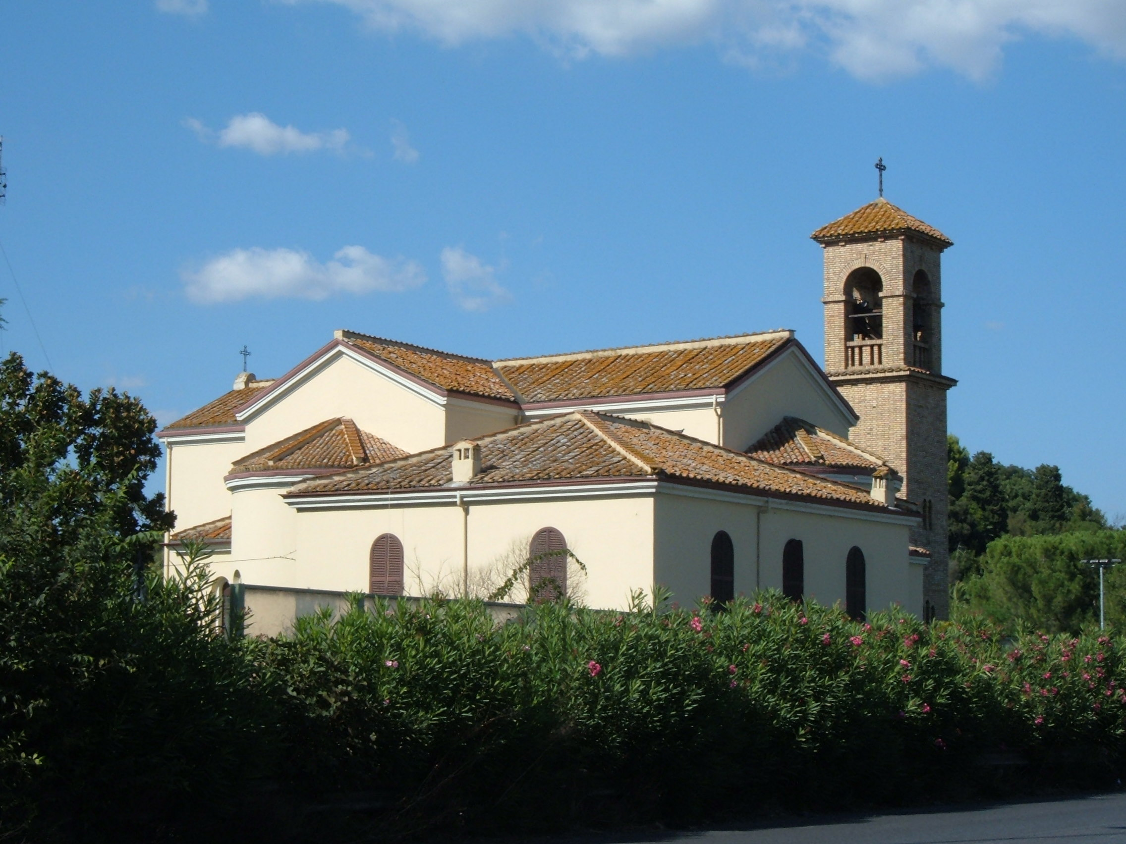 La chiesa di Santa Maria Immacolata a Grottarossa, Roma.